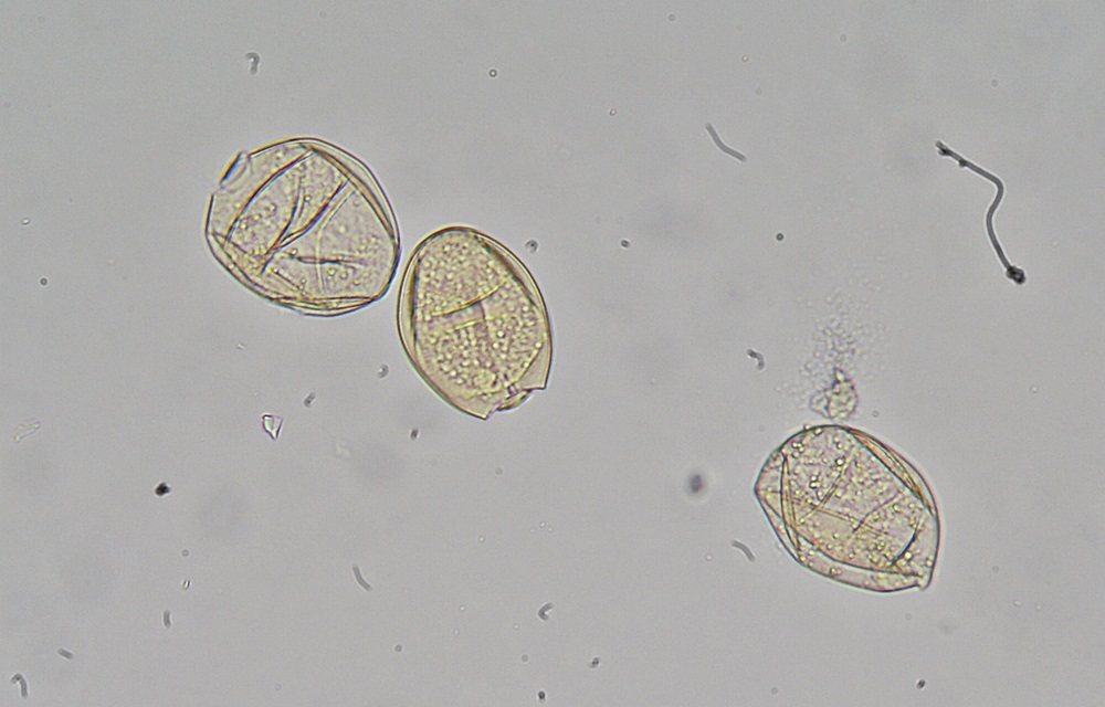 Leberegel, Fasciola hepatica, Eier